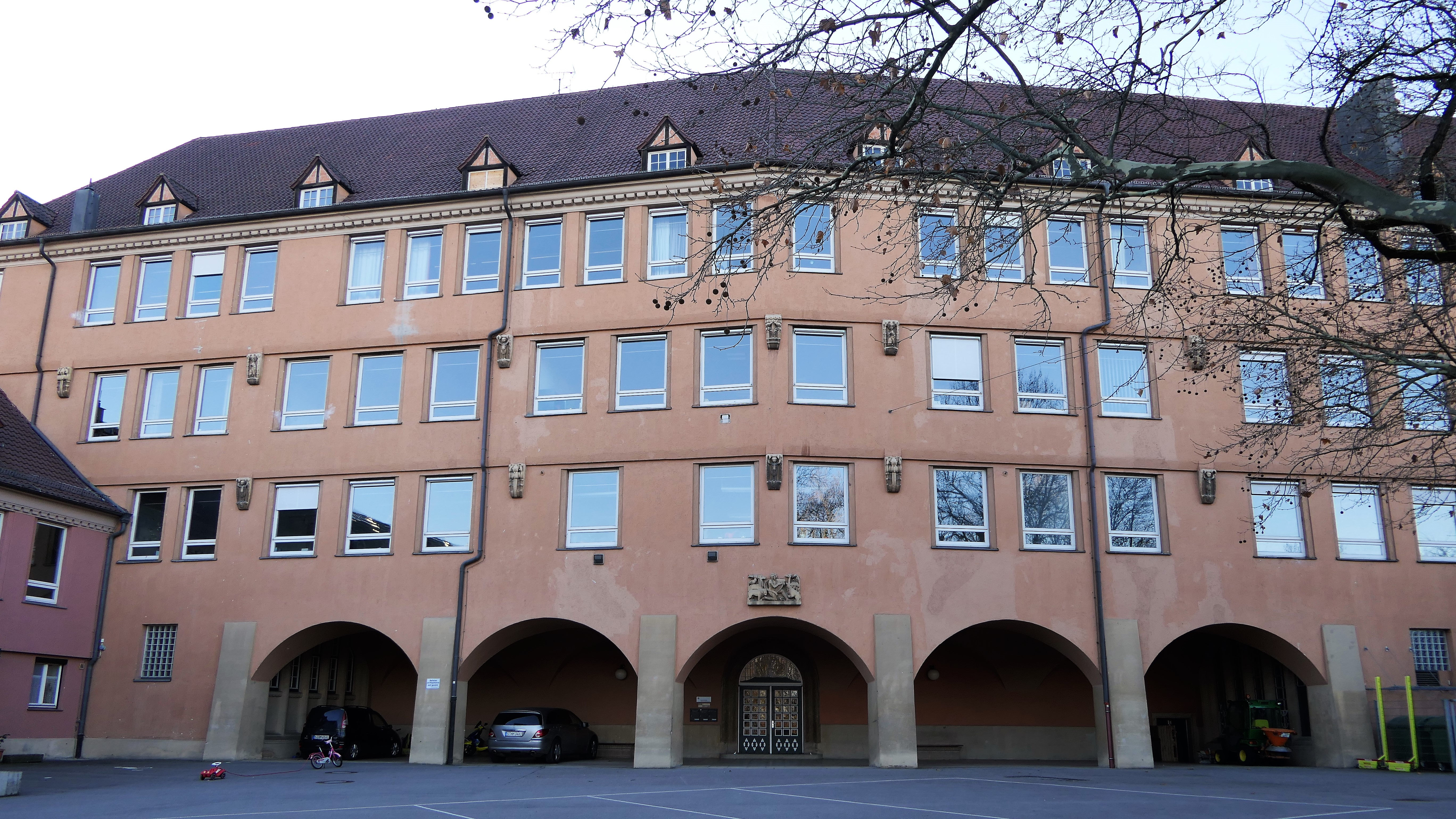 Wagenburg-Gymnasium, Stuttgart